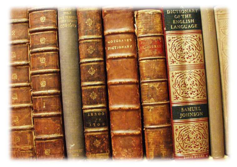 Spines, Bindings